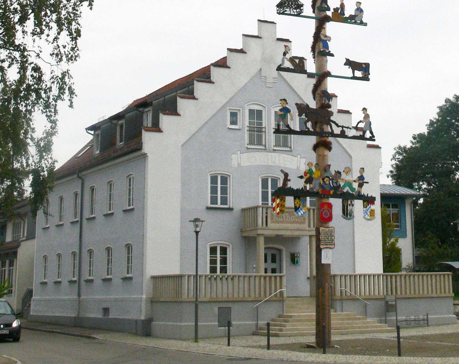 Rathaus, Benningen, Landkreis Unterallgäu